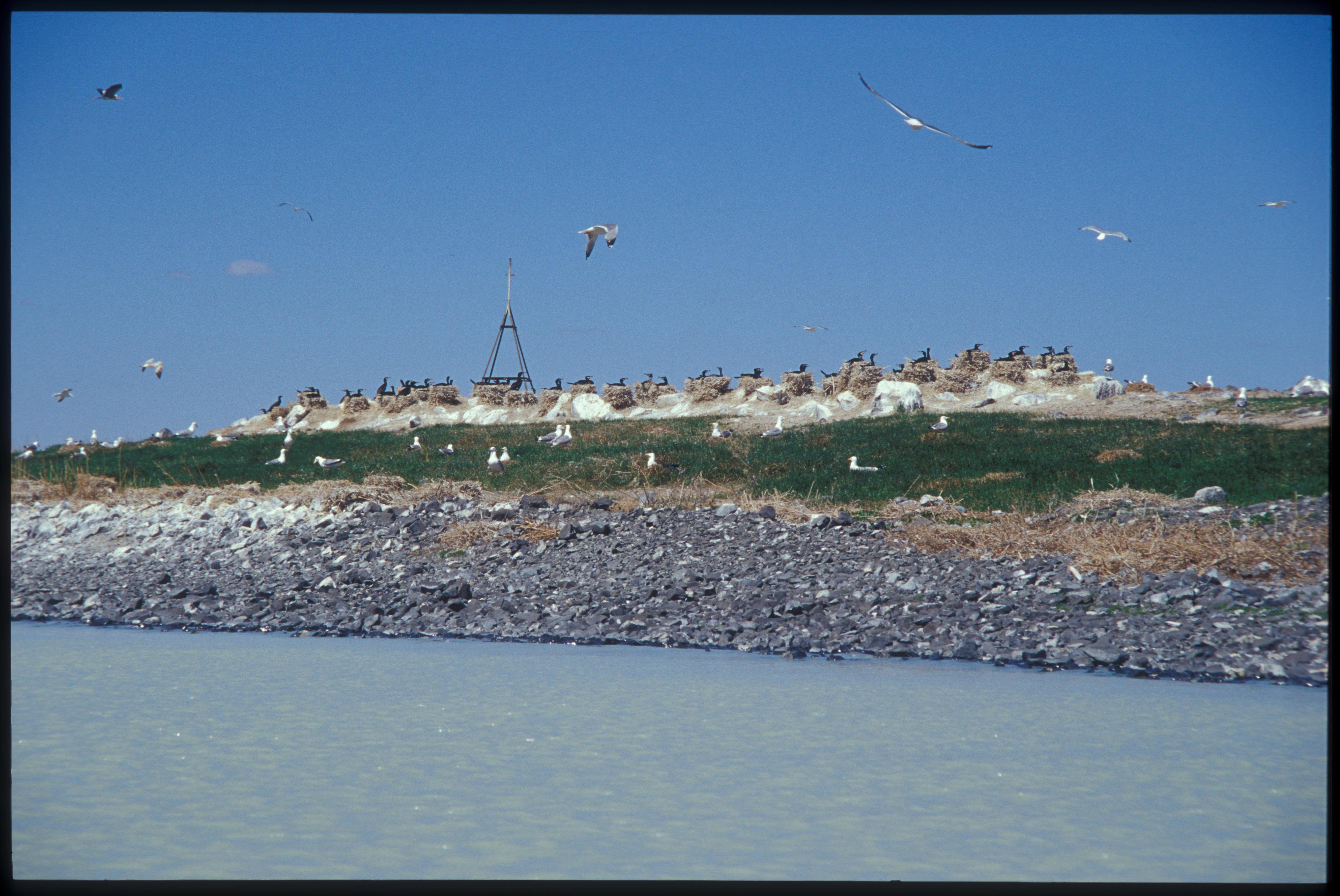 Даурский заповедник, Борзинский район This image is related to the protected area of Russia number 7500021